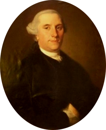 Portret van de Goudse burgemeester Gerard van Brandwijk (1704-1762), volgens K. F. O. James in "Burgemeesters van Gouda" geschilderd in 1753 door A. Schouman, volgens informatie op het schilderij van de bronwebsite in 1738